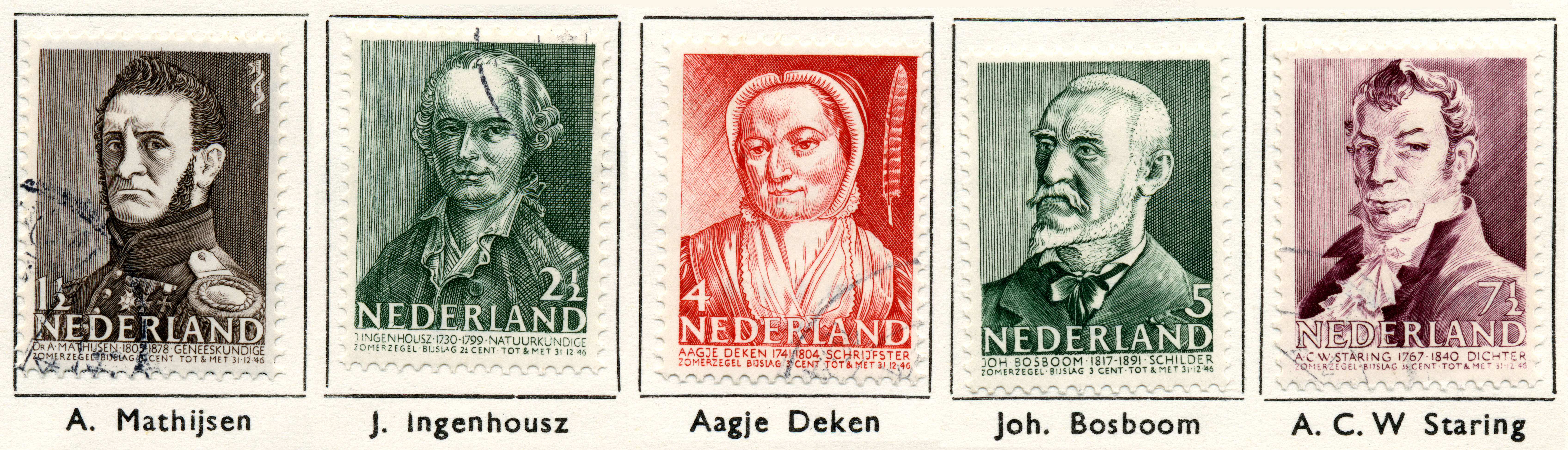 Zomerzegels (1941) Antonius Mathijsen, arts / J. Ingenhousz, bioloog / Aagje Deken, schrijfster / Johannes Bosboom, schilder / A.C.W. Staring, dichter. NVPH nr 392-396. Ontwerpers Jan van Krimpen (letters en cijfers), Kuno Brinks (1½ en 5 ct), Hubert Levigne (2½ ct), E. Reitsma-Valença (4 ct) en S.L. Hartz (7½ ct)